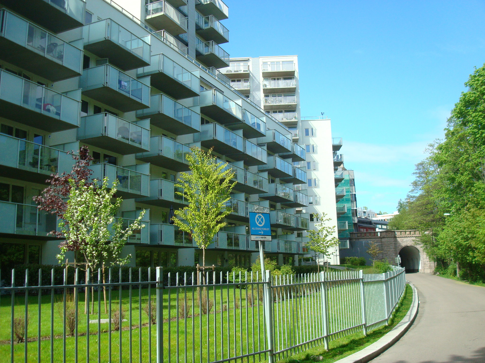 Waldemars hage i Oslo. Bilde av andre byggetrin med adresse til Darres gate. Gangvei etter Akerselven og Sannerbrua.